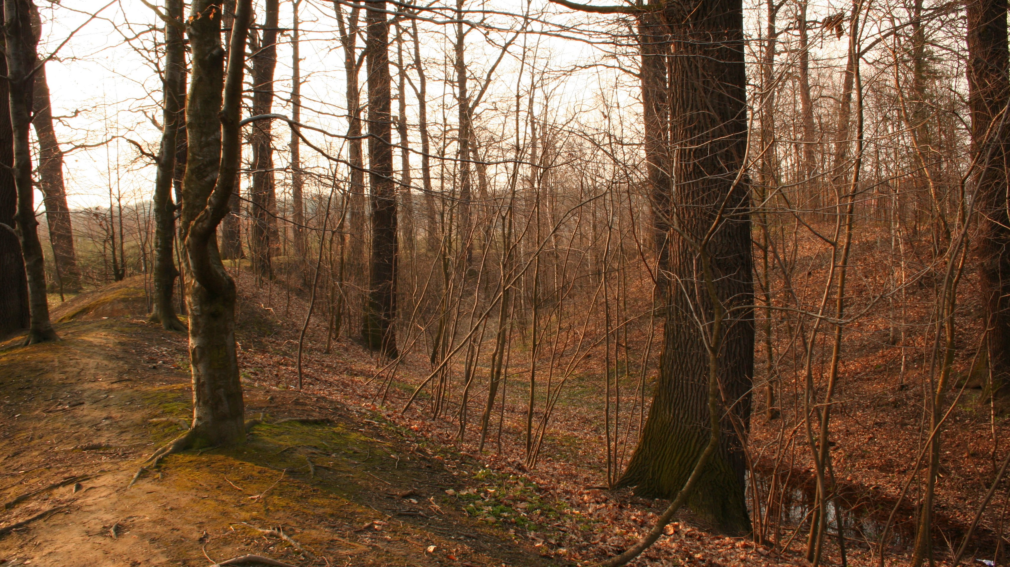 fosa grodziska w Grodzisku, gmina Wręczyca Wielka, powiat kłobucki, województwo śląskie